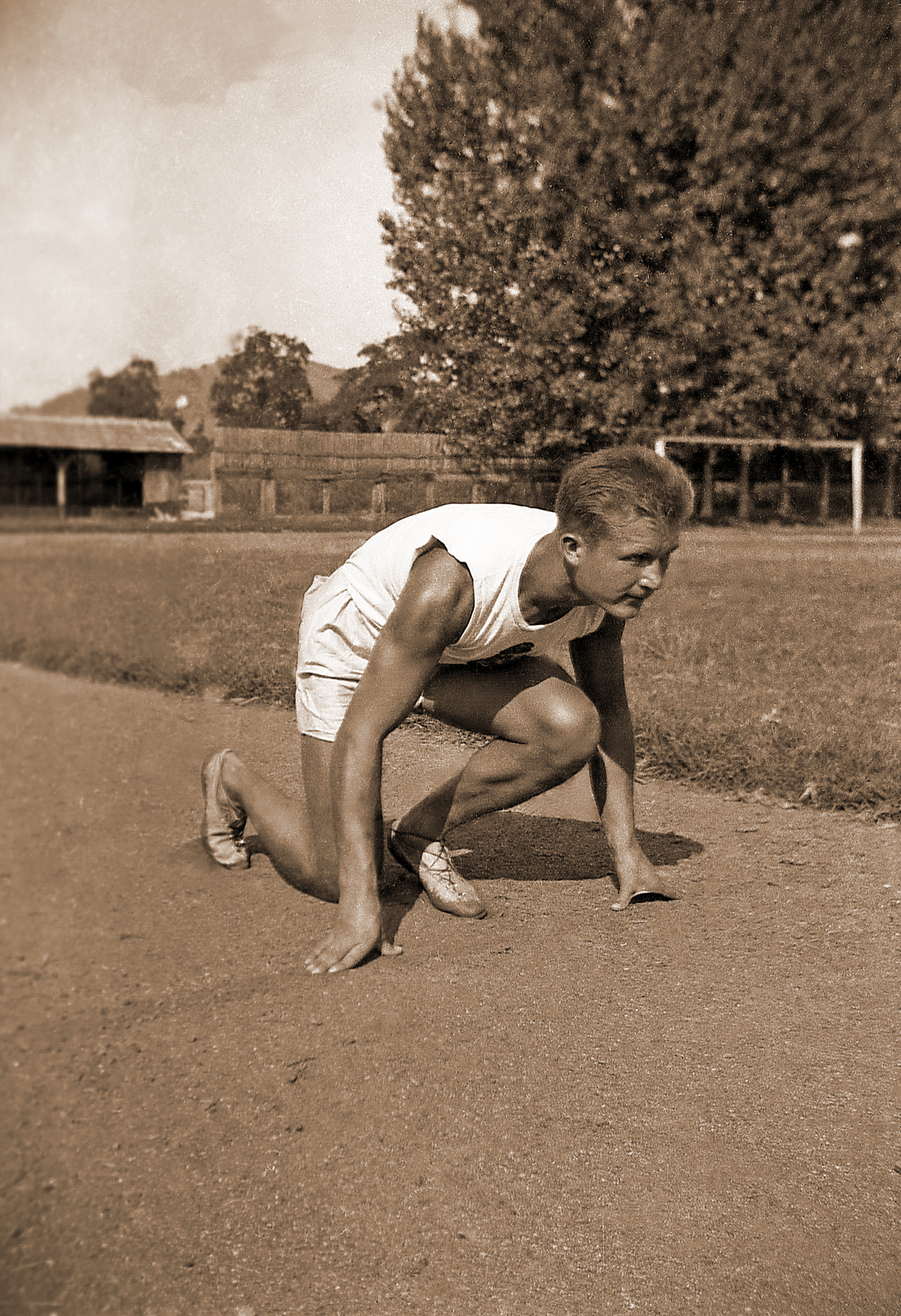 antrenament